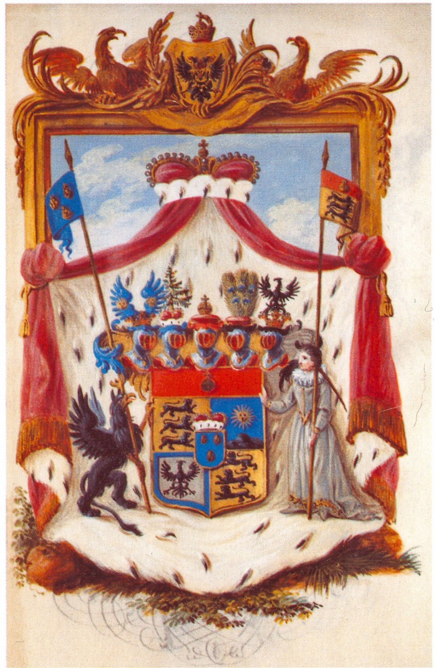 Familienwappen des Hauses Waldburg im Fürstendiplom vom 21. März 1803 Deckfarben auf Pergament Waldburg-Zeil’sches Gesamtarchiv Schloss Zeil